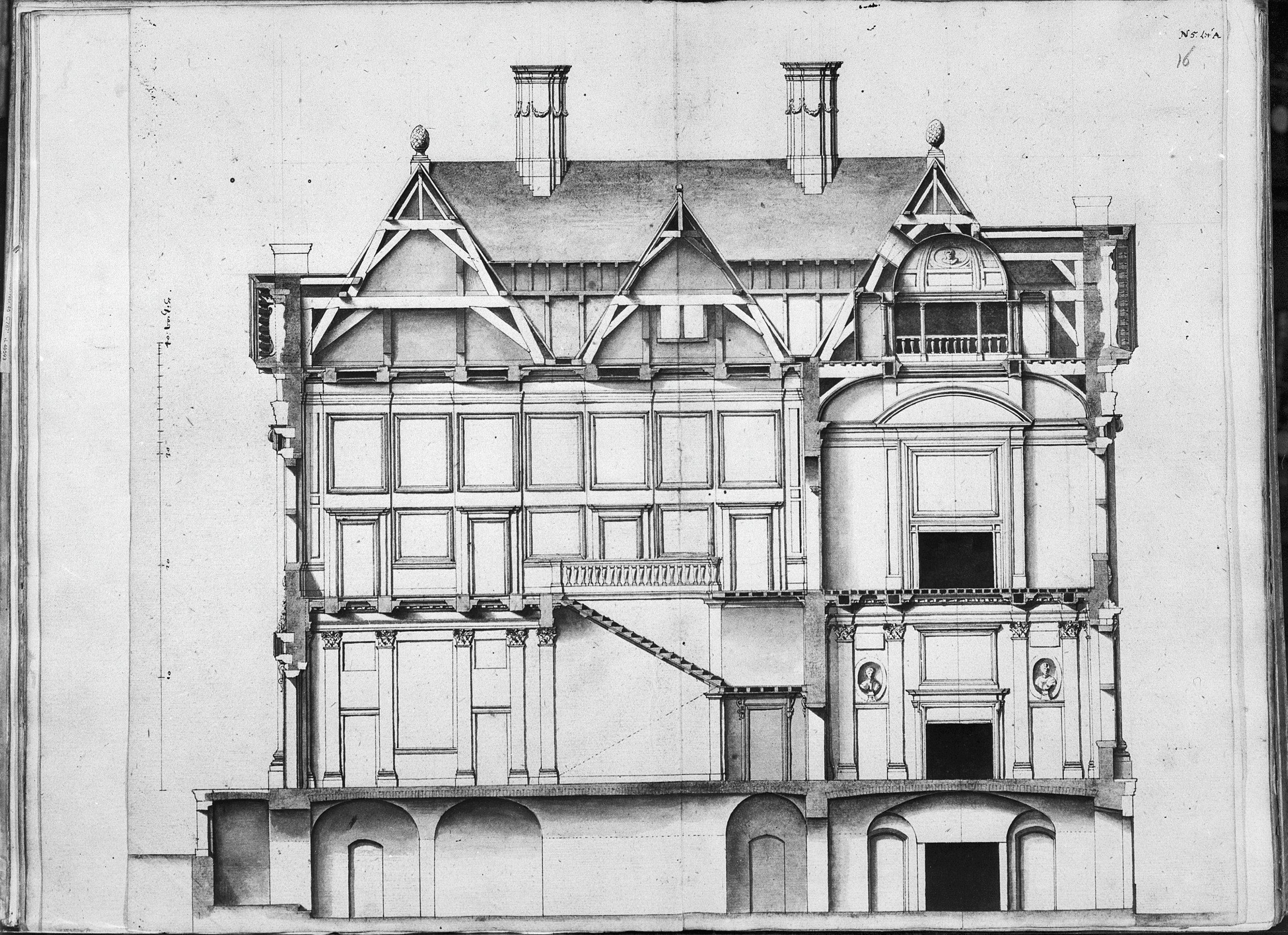 Mauritshuis: naar ets van P.Post in Koninklijke Bibliotheek 's-Gravenhage